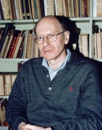 Victor Sadler en Biblioteko Hector Hodler, februaro 2004